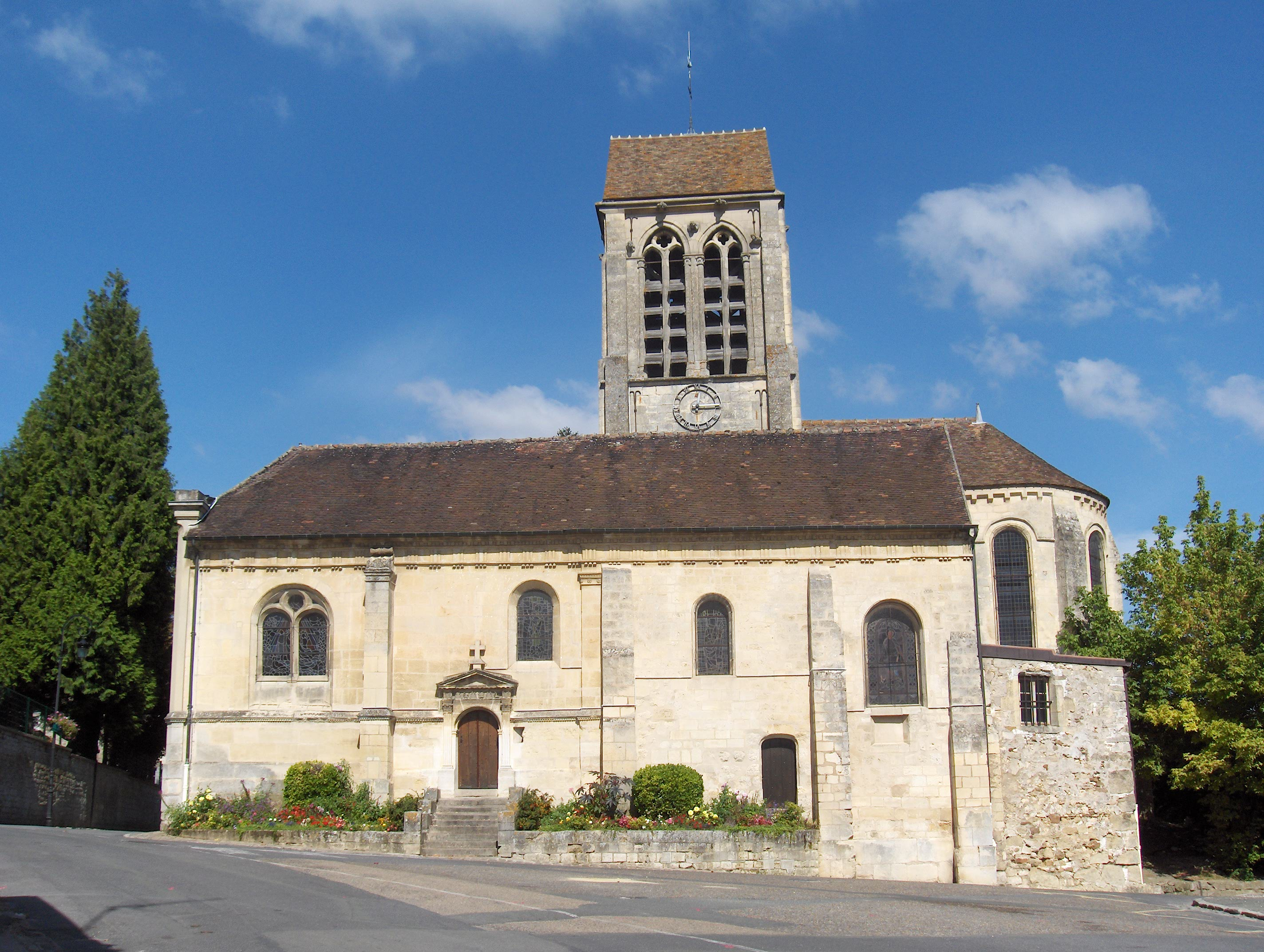 Eglise Saint-Denis de Jouy-le-Comte à Parmain (12-13e siècles)